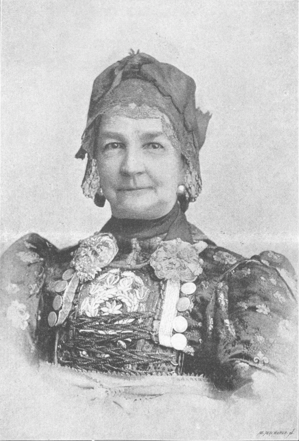 Amalie Schönchen (1836-1905), German vocalist and actress